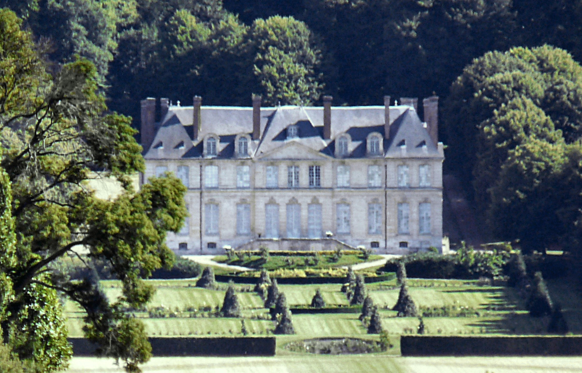 Gartenfassade des Schlosses Yville in der Normandie